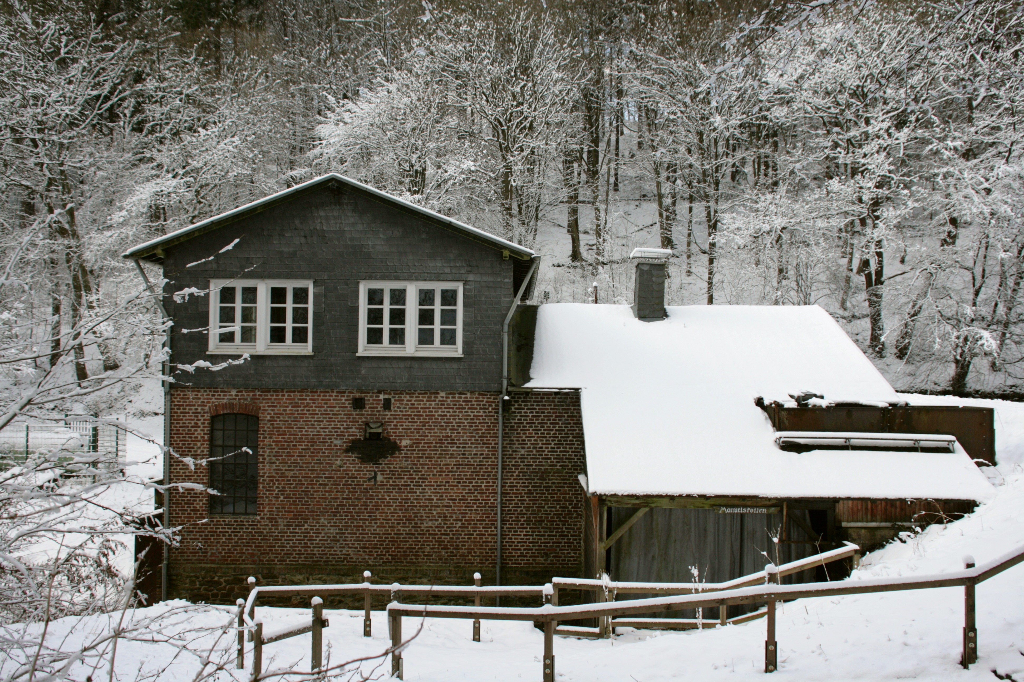 Manuelskotten in Wuppertal